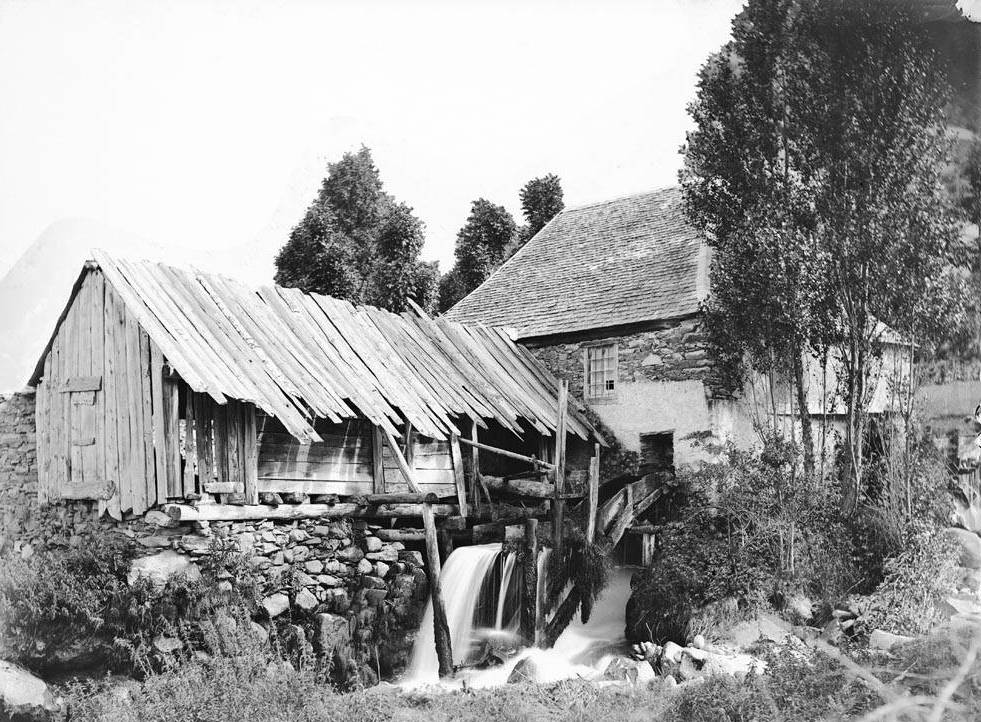 Imatge